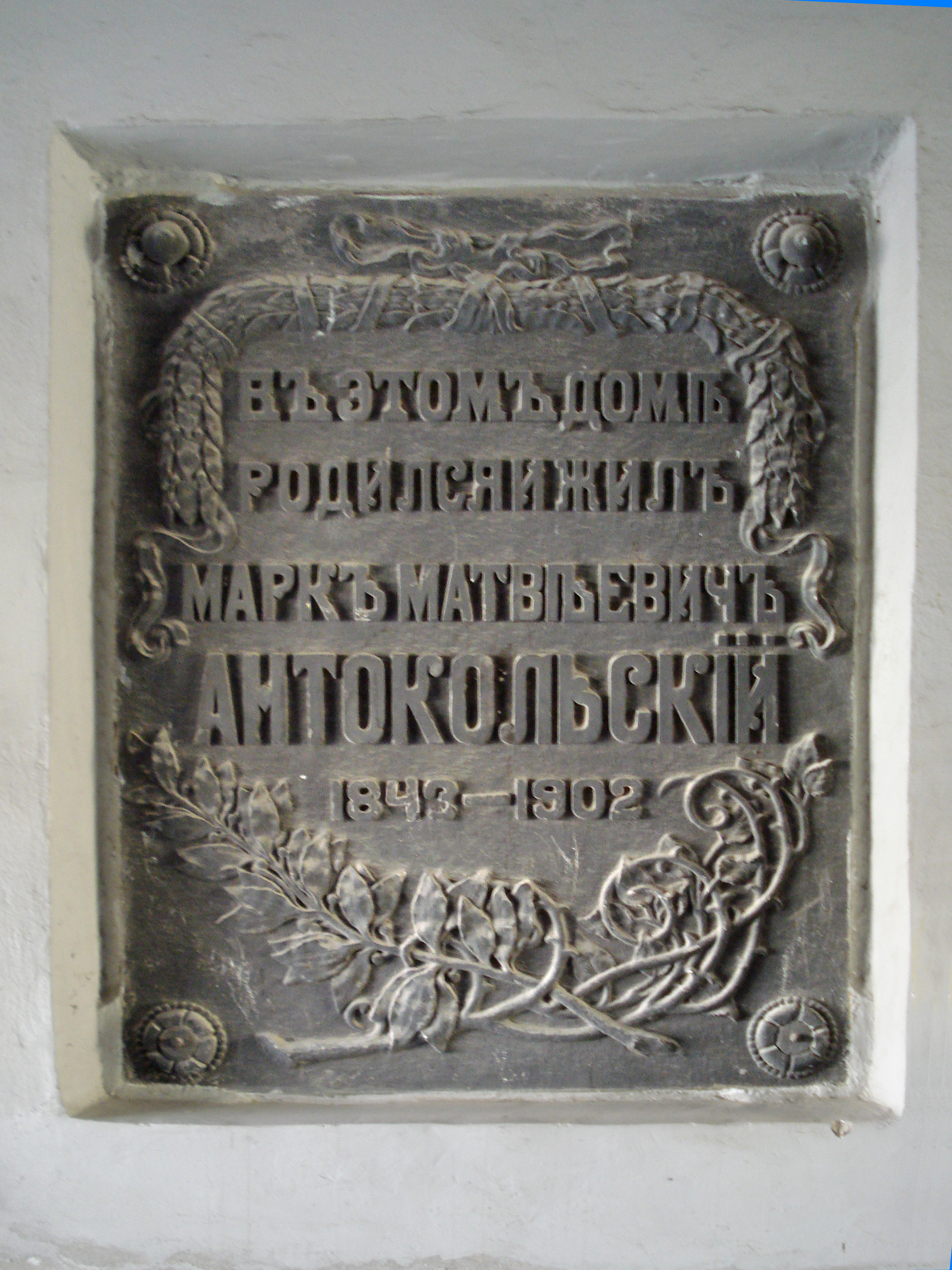 Mark Antokolski memorial tablet in Vilnius